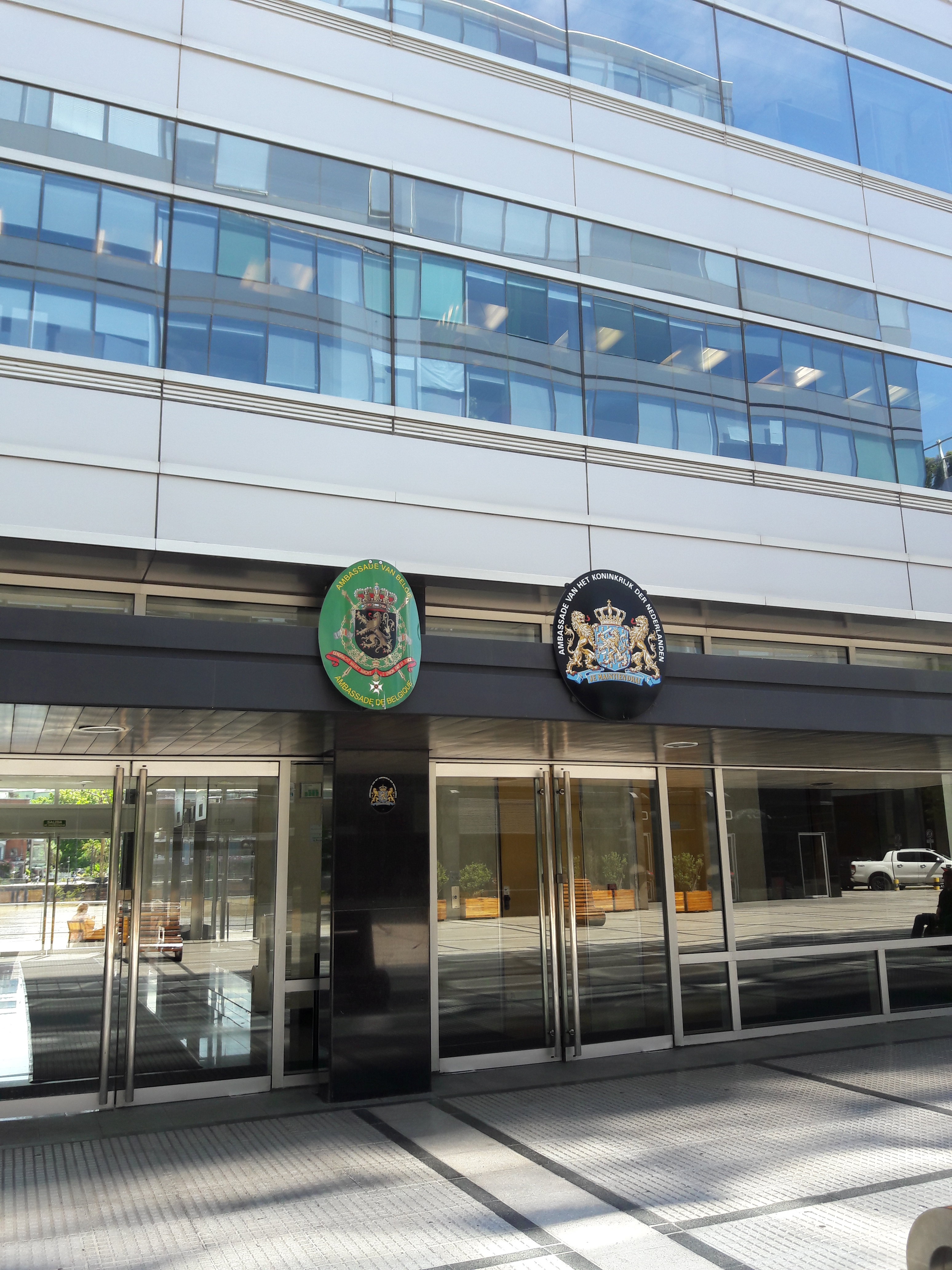 Embajadas de Bélgica y Países Bajos, Puerto Madero, Buenos Aires, Argentina.